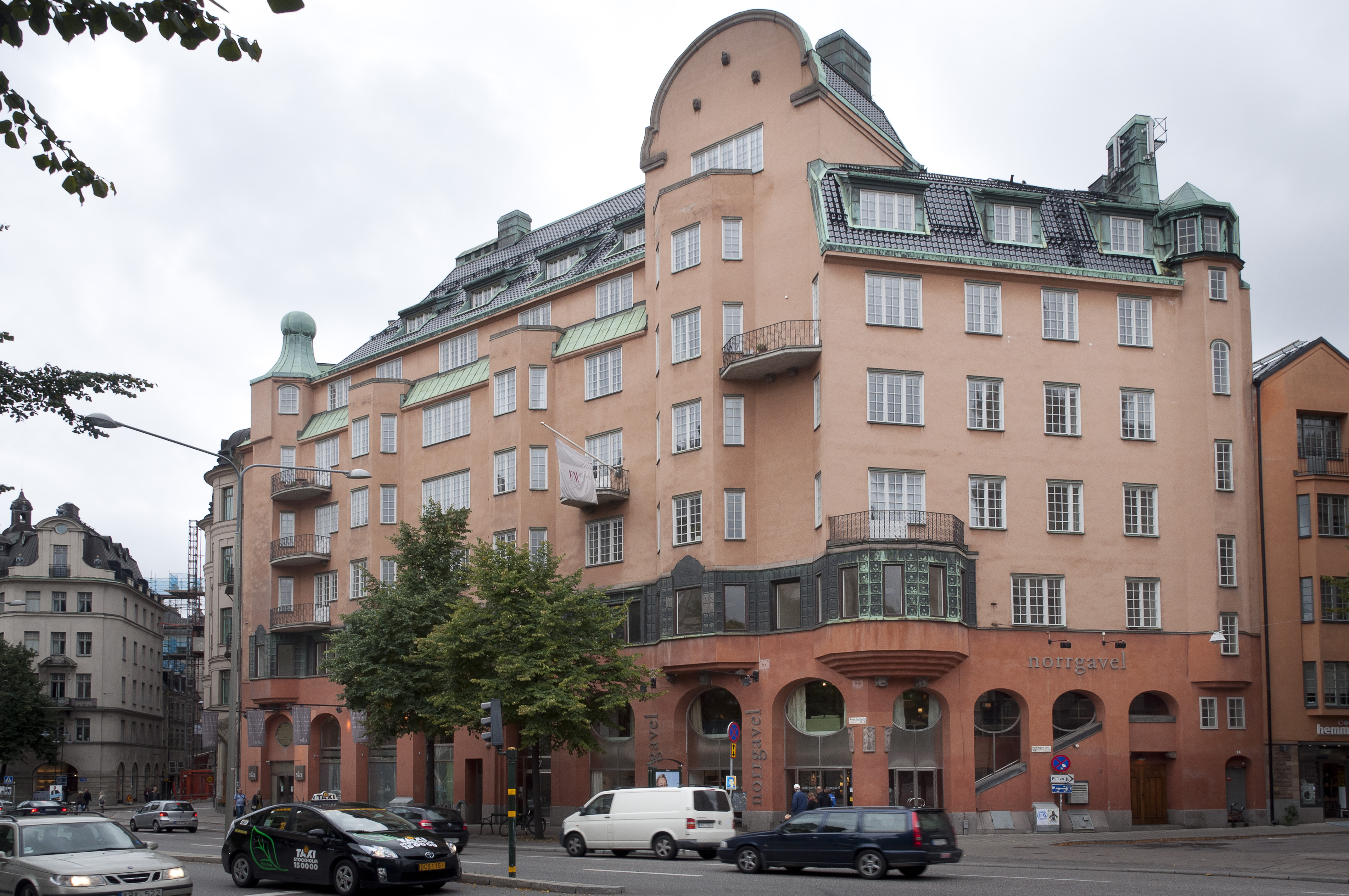 kv. Österbotten 18, Birger Jarlsgatan 27, David Bagares gata 1 . Nya Intima Teatern. Byggnadsår 1910-12, arkitekt Carl Bergsten, byggherre och byggmästare Ernst Lundberg.